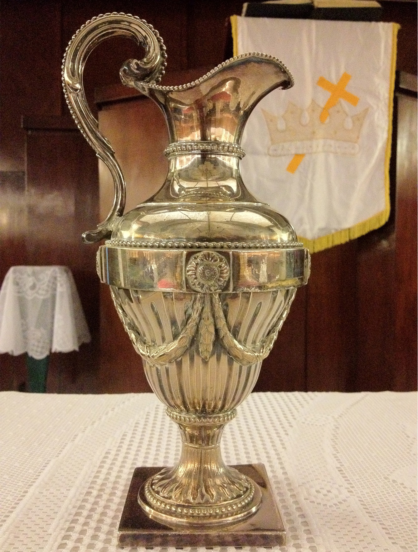 GPIB Paulus